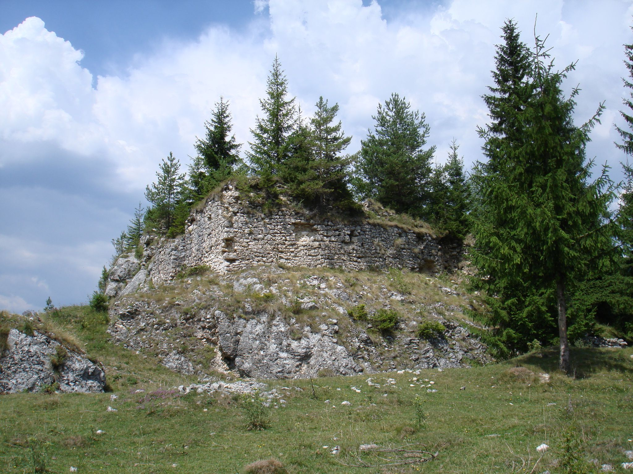 Cetatea Oratea